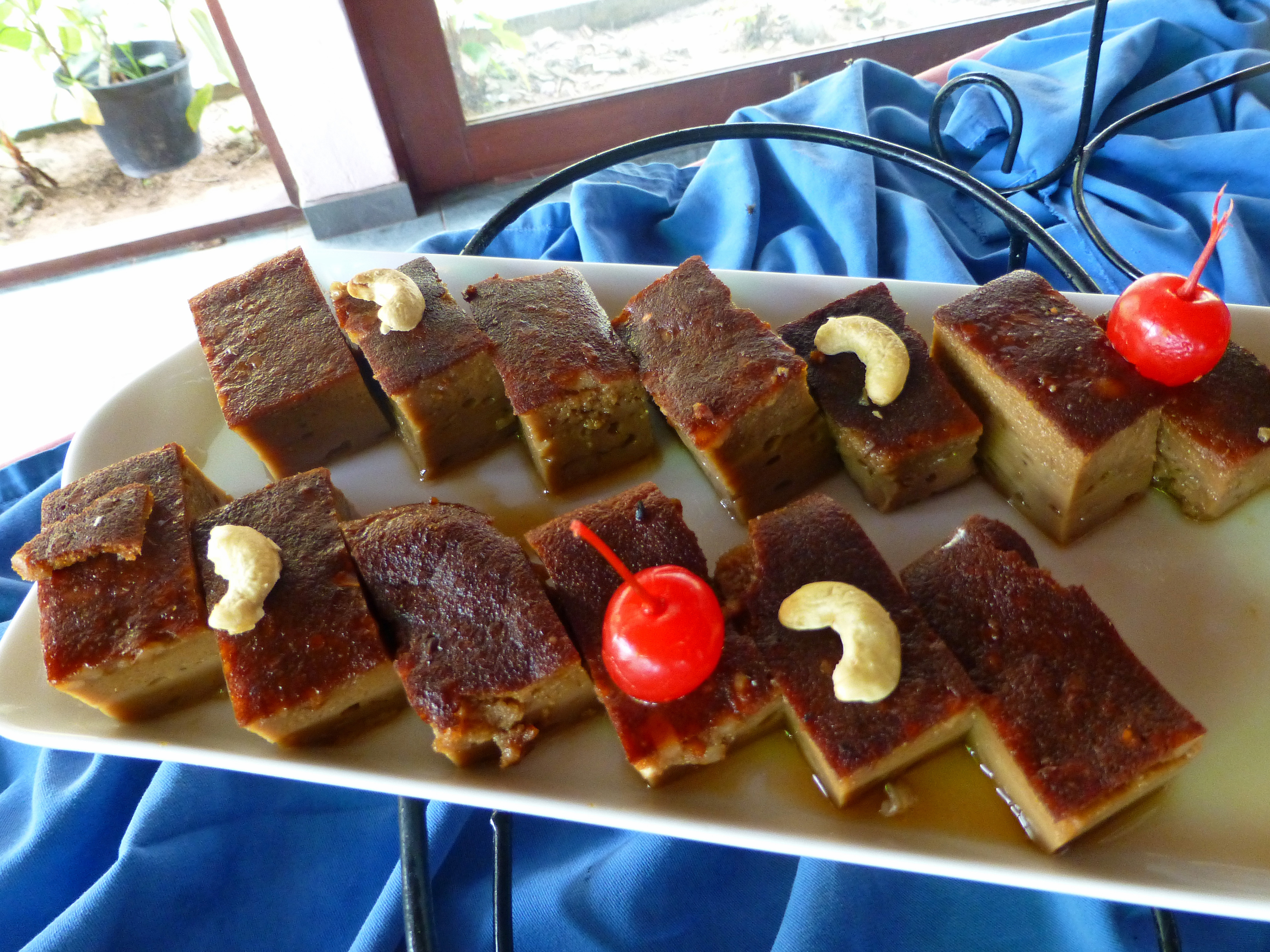 Watalappan (Sri Lanka)